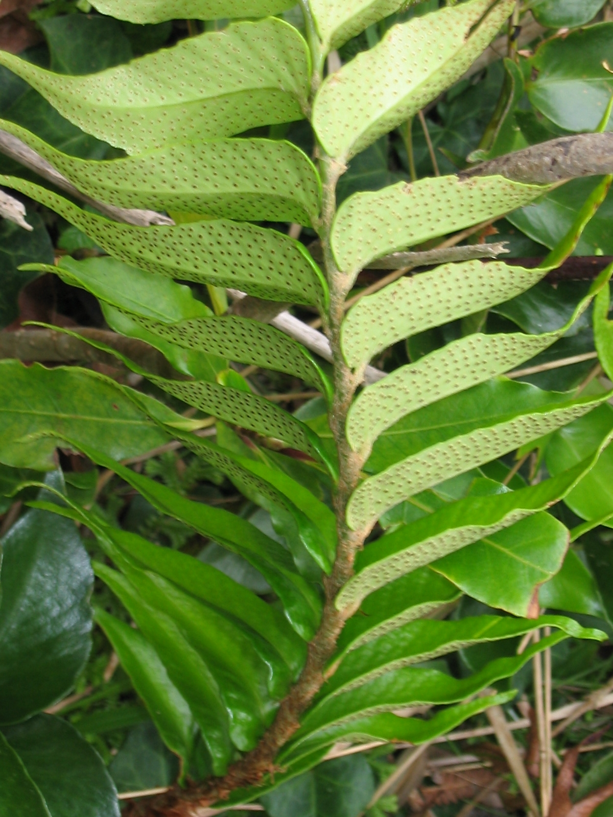 Sichelförmiger Farn (Cyrtomium falcatum) - Sori